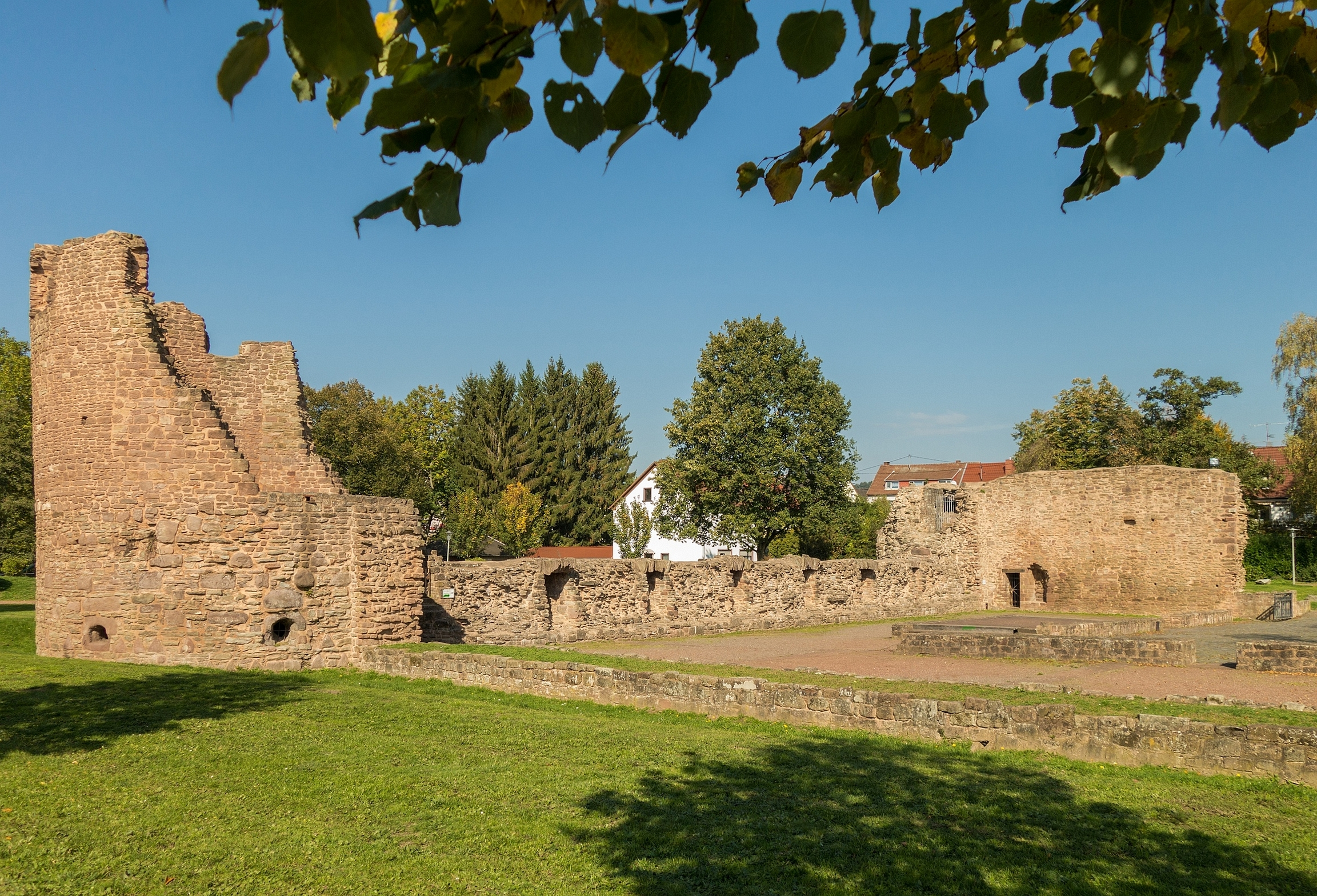 Burg Bucherbach im Püttlinger Ortsteil Köllerbach